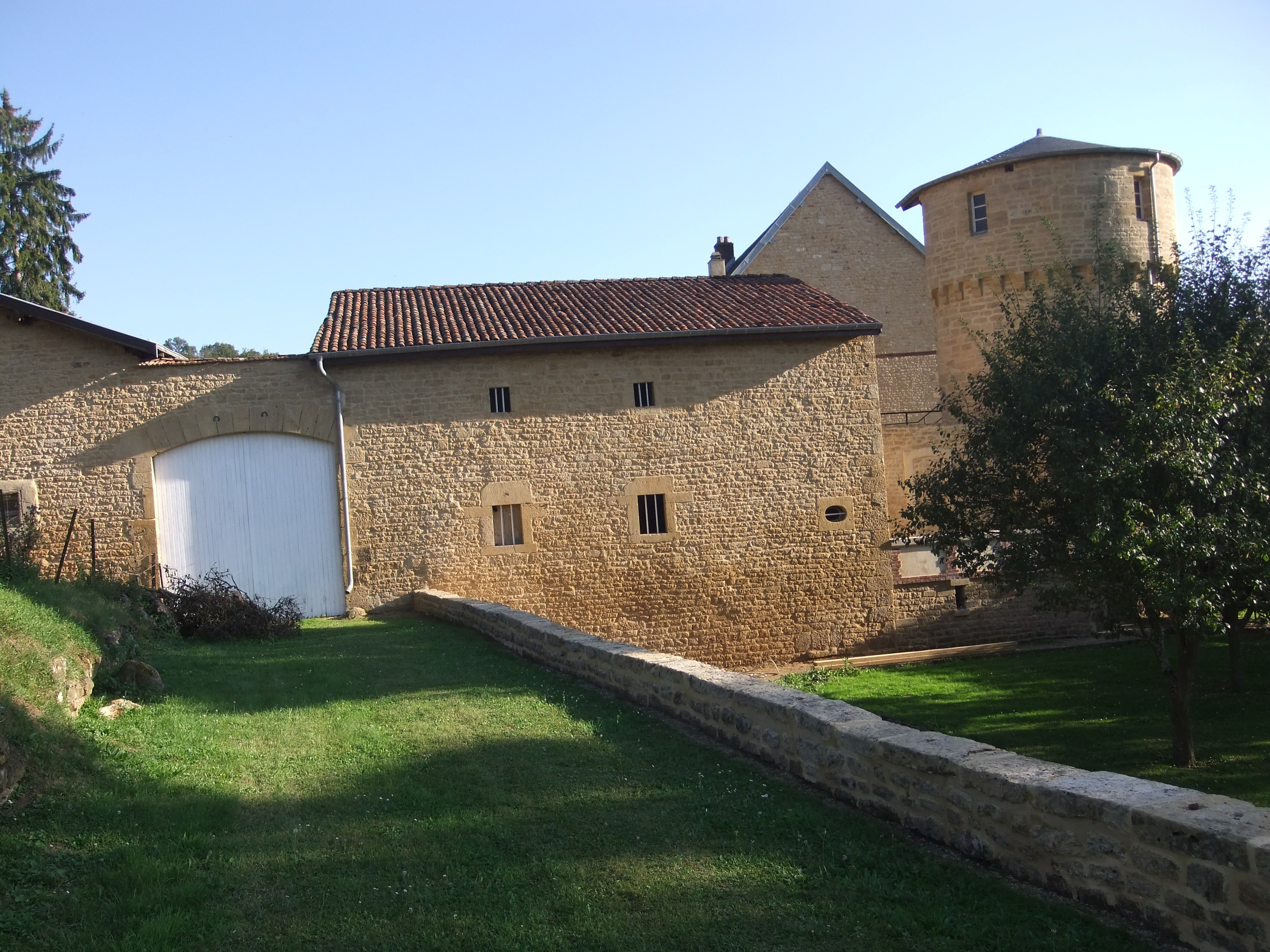 Château de Villette (54), vu de côté, en 2012